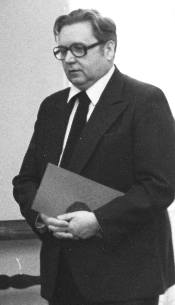 Kazimierz Urbanik na jubileuszu 60-lecia (i 40-lecia pracy naukowej) prof. Henryka Zielińskiego na Uniwersytecie Wrocławskim